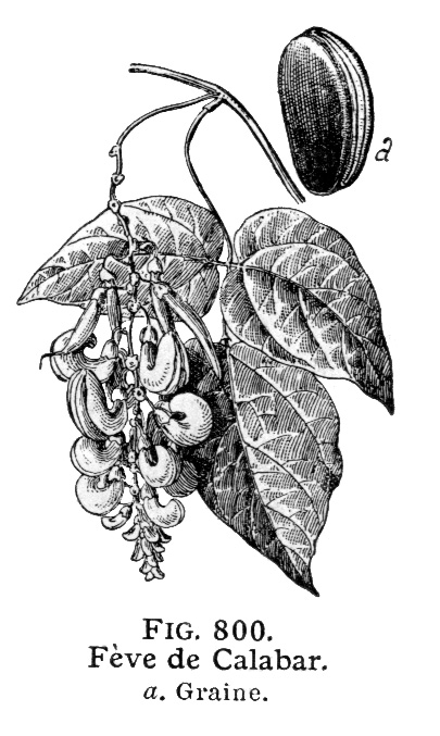 Féve de Calabar. Plante de la famille des Légumineuses dont la graine est employée comme antiépileptique, contient le principe actif (toxique), Esérine. Larousse Medical Illustré, Paris, 1912. Galtier-Boissière (org.)